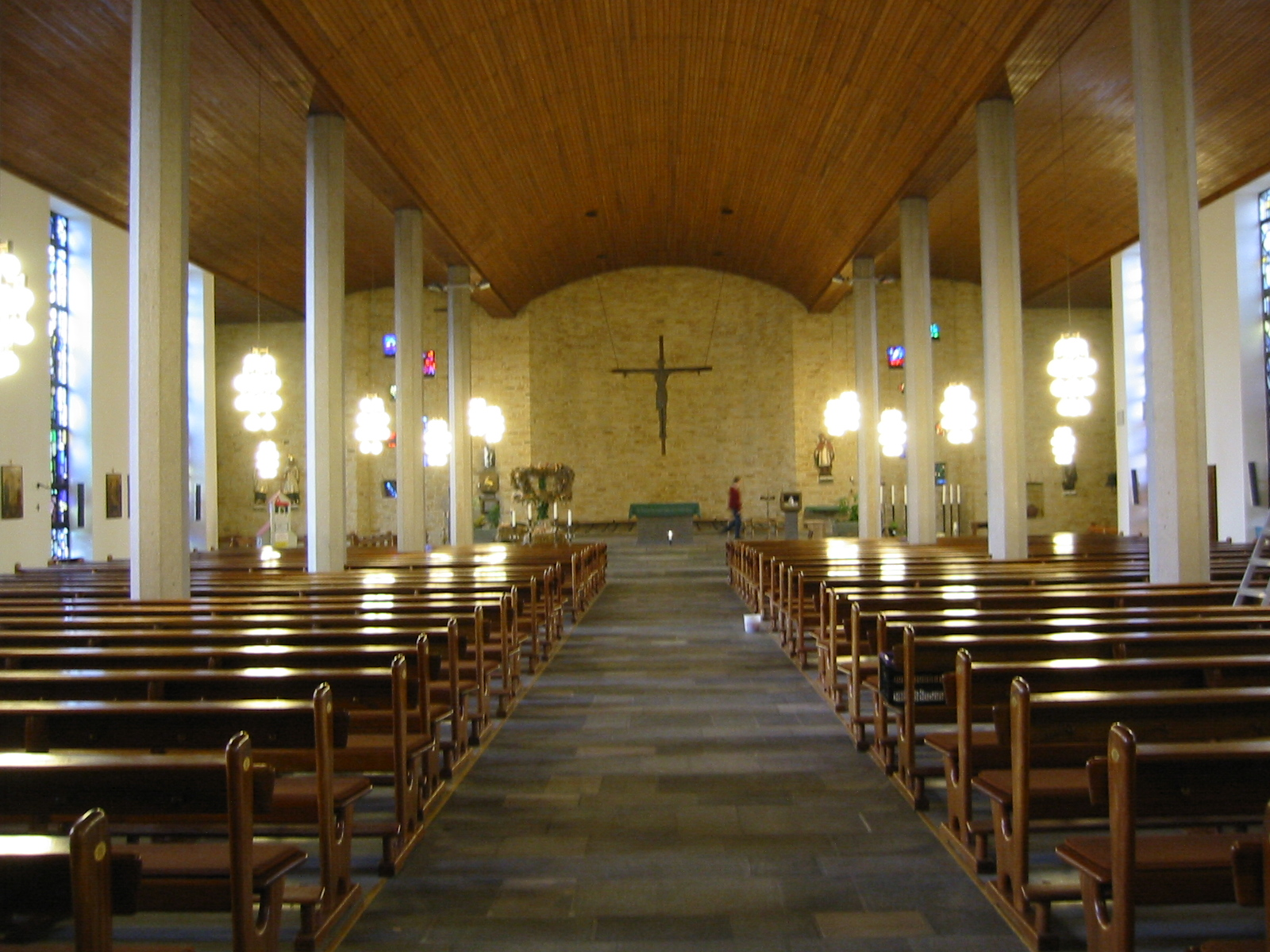 Das Innere der großen St.Ambrosius Kirche in Ostbevern